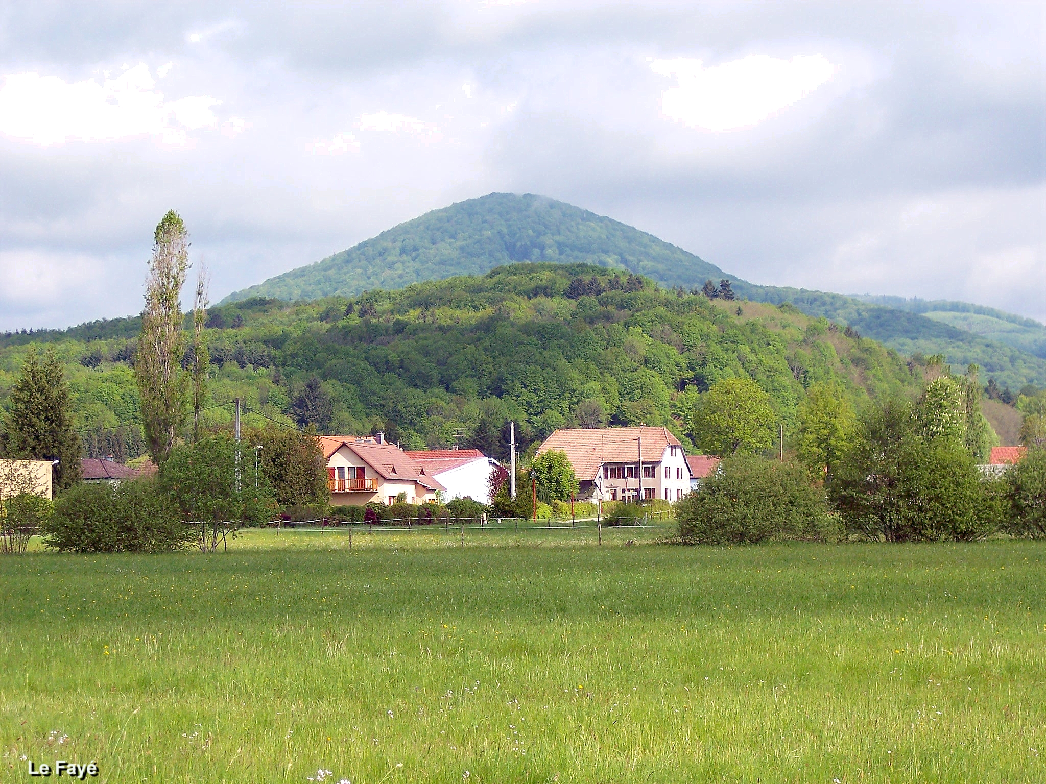 Montagne vosgienne, le Fayé, vue depuis Etueffont. Territoire de Belfort